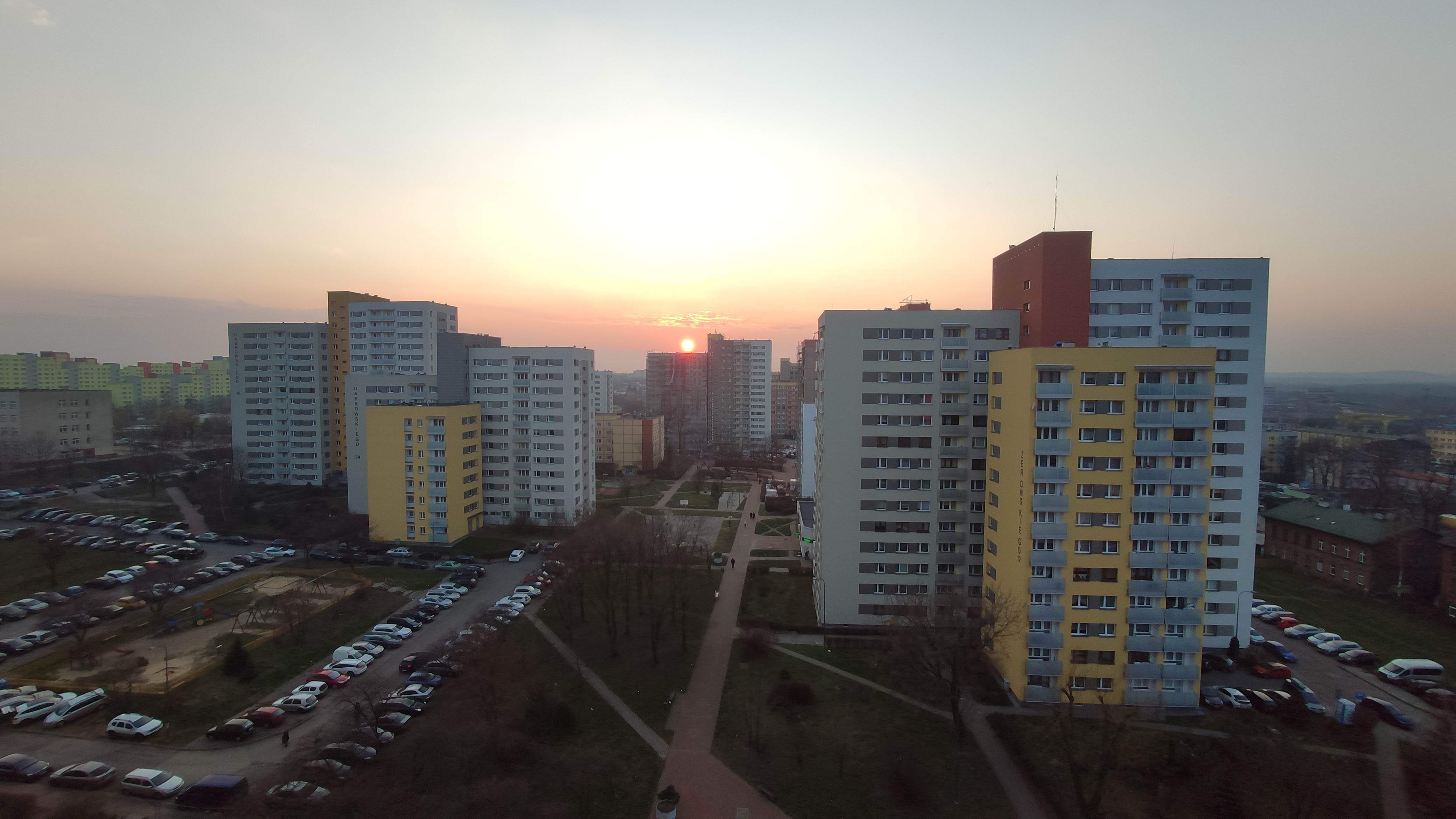 Bloki w północnej części dzielnicy Mydllice w Dąbrowie Górniczej